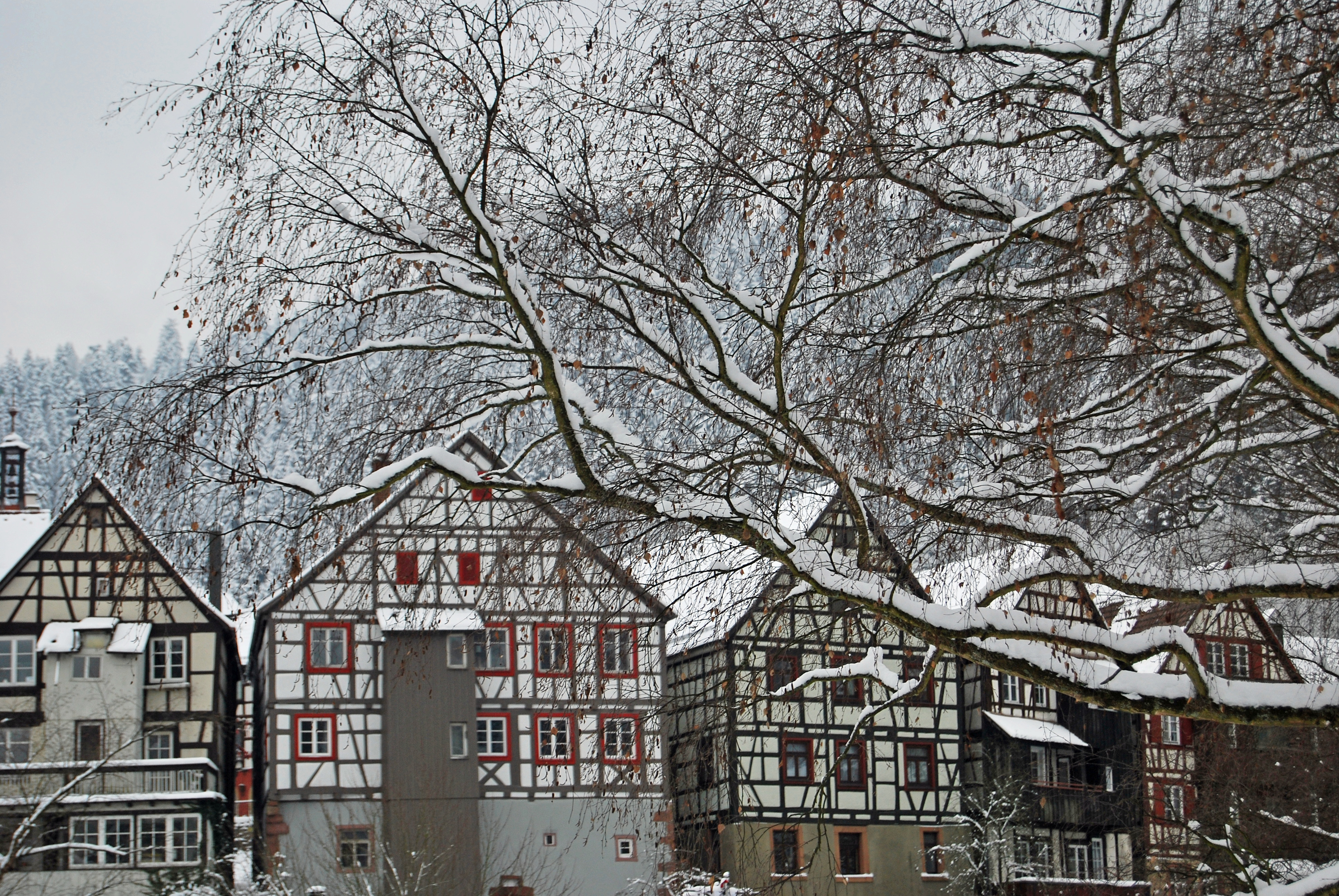 Altstadt von Schiltach im Winter